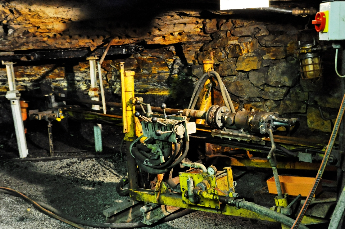 Klosterstollen Barsinghausen 2015